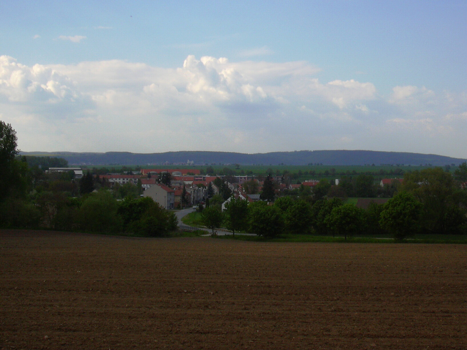 Pohled na Heroltice ze silnice směr Rybníček (Vyškov- Czech republic)